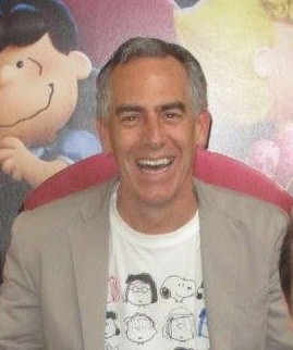 Steve Martino au festival international du film d'animation d'Annecy